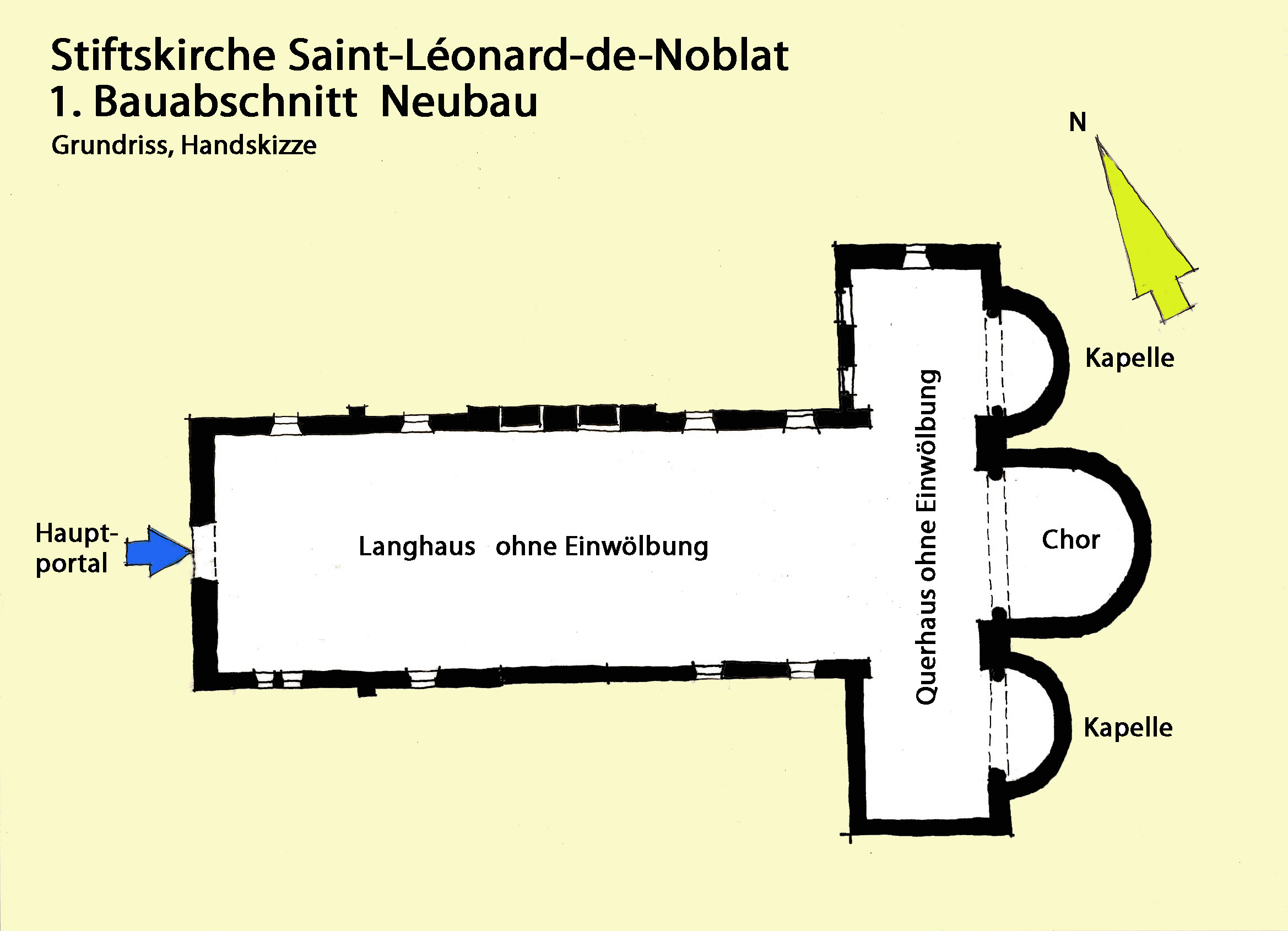 Stiftskirche Saint-Léonard-de-Noblat.1.BA, Handskizze